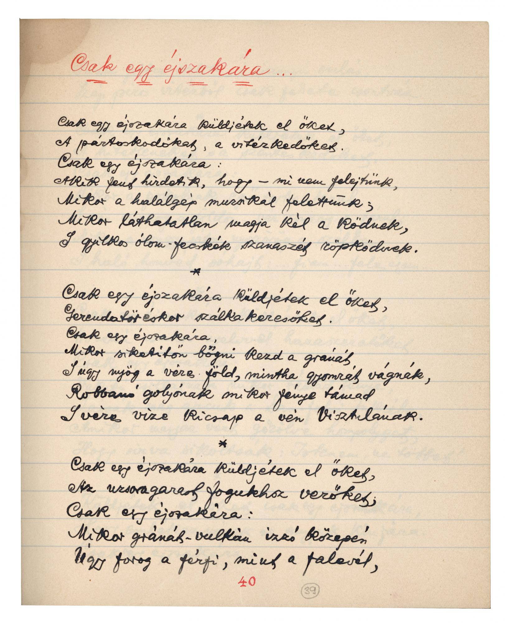 A Csak egy éjszakára... című vers kézirata.